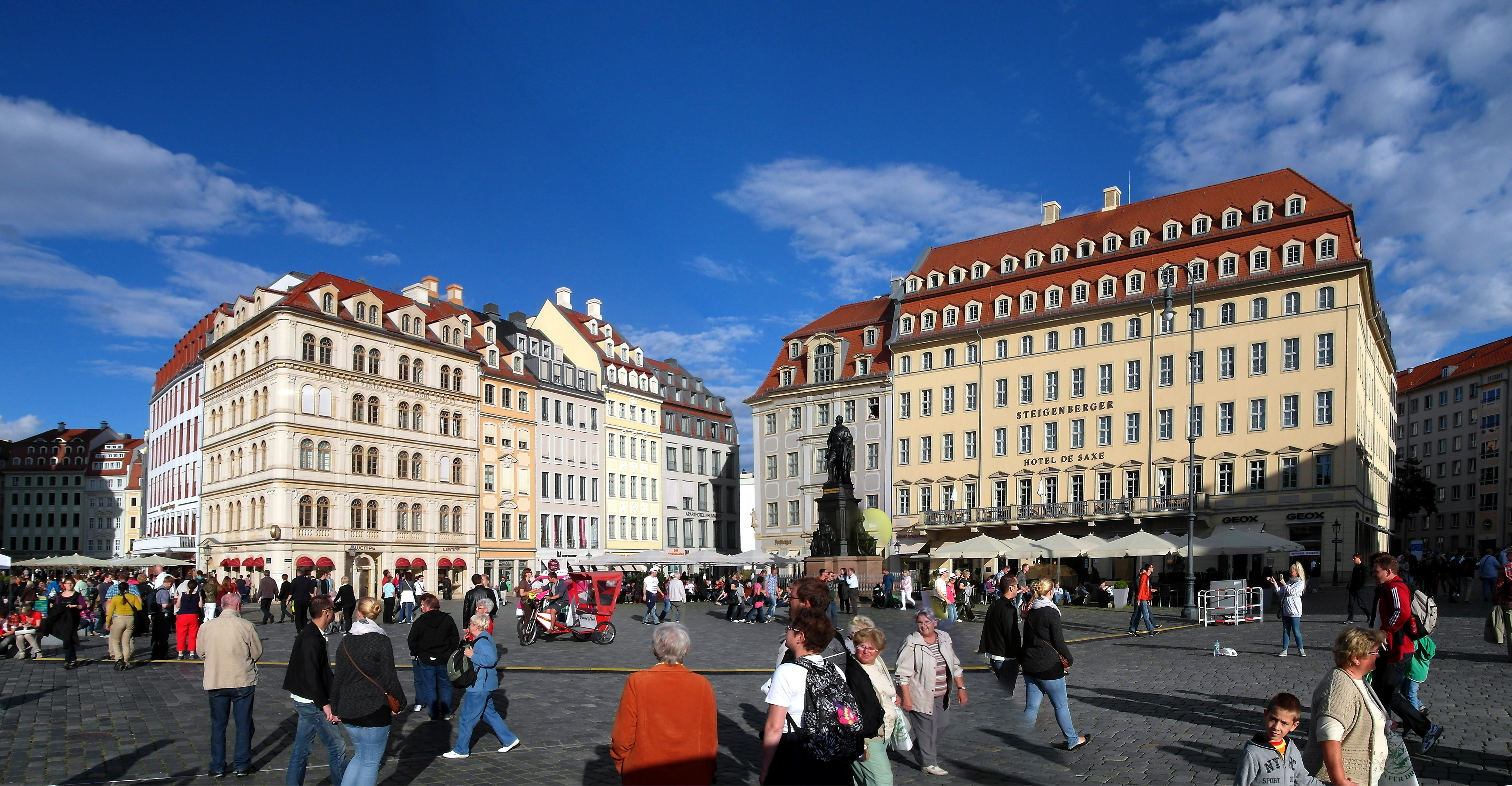 16.08.2014 Dresden Neumarkt: Platzansicht von West nach Ost über den Neumarkt. V.l.n.r.: - An der Frauenkirche 22 (ehemals "Hotel Fürst Bismarck"). Moderner Neubau 2008 / - Eckhaus Neumarkt 4 entstand erst um 1850 in oberitalienischen Renaissance. / - Neumarkt 5: Ein komplizierte Baugeschichte hat das Haus Neu- markt 5/6 hinter sich. Die linken, drei Fensterachsen umfassende Haushälfte (Neumarkt 5) wurde 1730 Barock errichtet und nach dem Siebenjährigen Krieg wieder aufgebaut. 1790 hat man die beiden Häuser Neumarkt 5 und 6 zu einem vereinigt. Zwischen 1820 und 1830 kam ein Geschoß hinzu / - Neumarkt 6: Ein Neubau der Architektin Heike Böttcher, 2008 / - Neumarkt 7: Historischer barocker Nachbau 2008 / - Haus Landhausstraße 1: Moderner Neubau 2008. Die zusammengehörenden Hauseinheiten Landhausstraße 1 und Neumarkt 7 sollen als Ärztehaus genutzt werden. / - Auf der anderen Straßenseite, weiter rechts im Bild: Neumarkt 8 / Ecke Landhausstraße. Bis 1945 die Salomonis-Apotheke. Gaststätte "Freiberger Schankhaus". Davor das Denkmal für Friedrich August II / - Neumarkt 9, Steigenberger Hotel de Saxe mit der Fassade des 1888 abgerissenen Originals. .: [SAM5433-5434.JPG]20140816085MDR. JPG(c)Blobelt